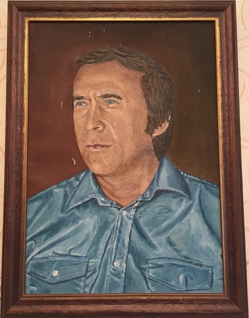 Проф. Кузнецов В.В., автопортрет, 1982-1984 г., холст, масло. Фотография картины сделана дома в Москве.